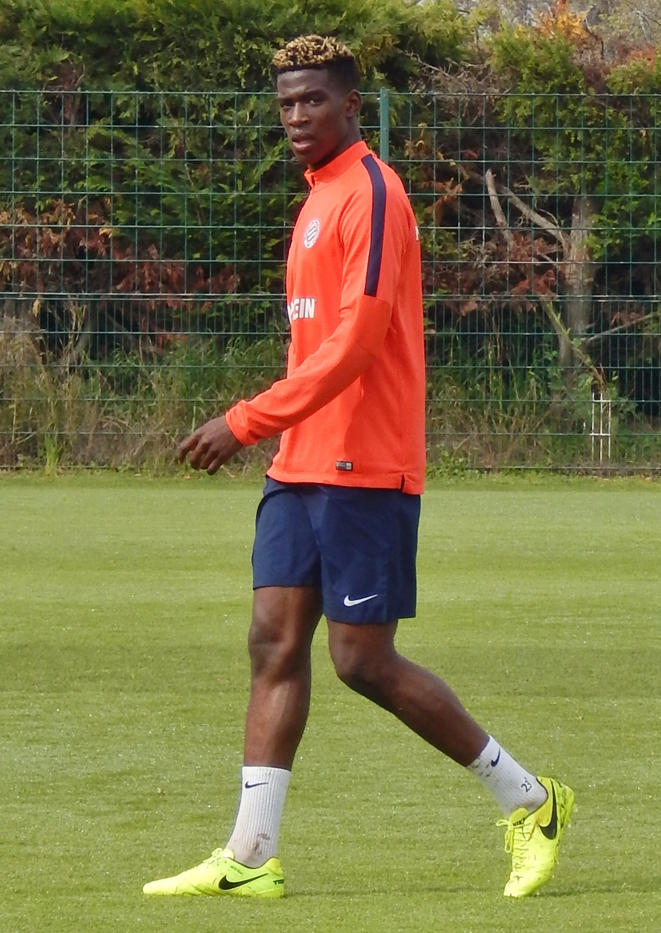 Nordi Mukiele, 2017.